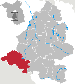 Niedergörsdorf in Brandenburg (Country) - District Teltow-Fläming